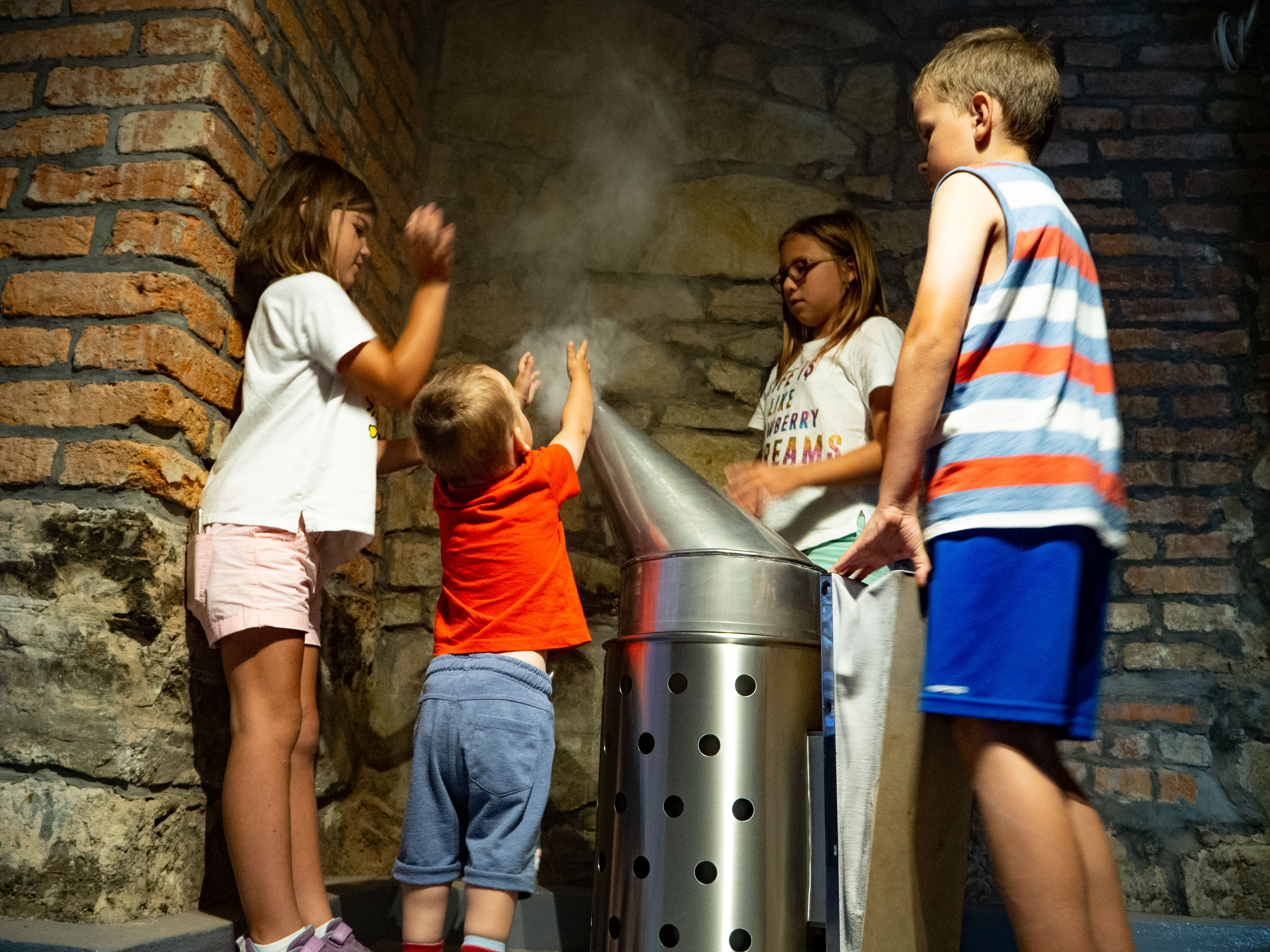 APILANDIA Interaktywne Centrum Pszczelarstwa w Kleczy Dolnej Interakctive Beekeeping Centre in Poland